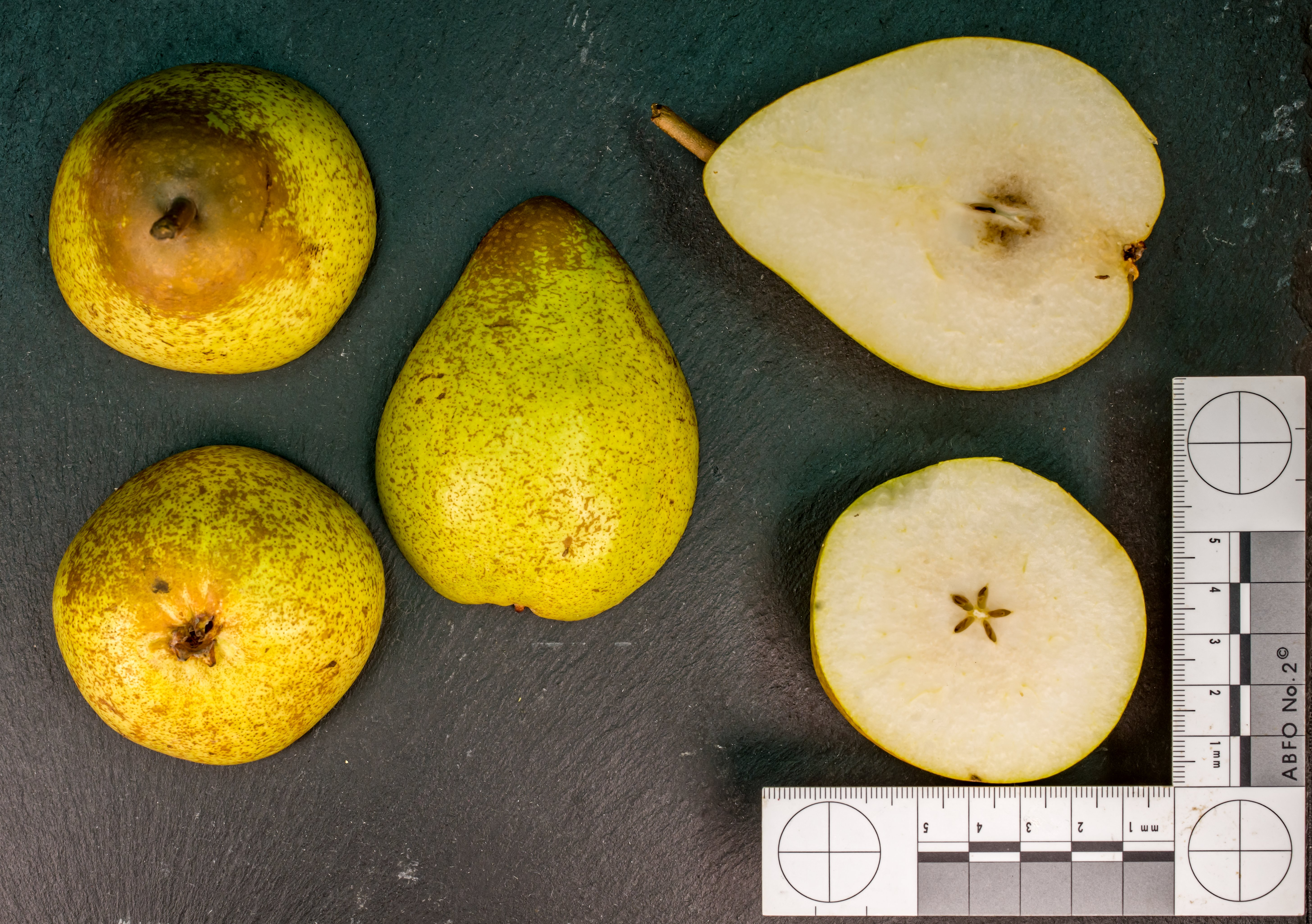 Birnensorte: Rocha